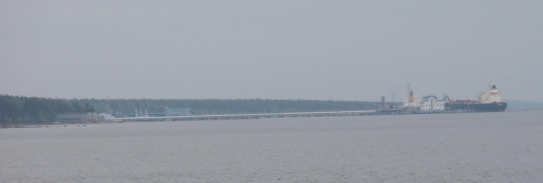 Oil harbour at Primorsk